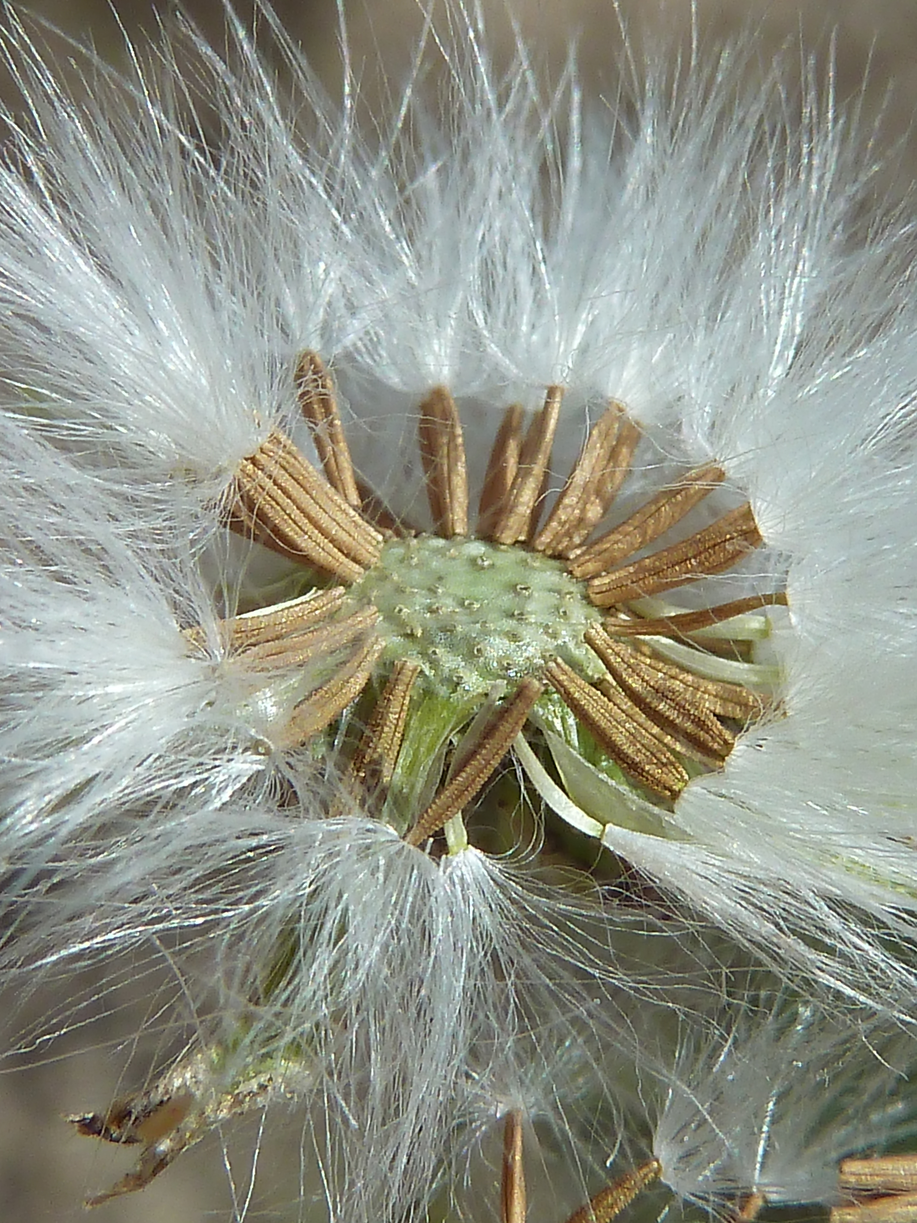 Sonchus tenerrimus - (cerraja menuda, cerraja tierna,...) - Capítulo en fructificación con cipselas in situ. - calle Compositor Manuel Berná García con San Antonio, Albatera (Provincia de Alicante, España).